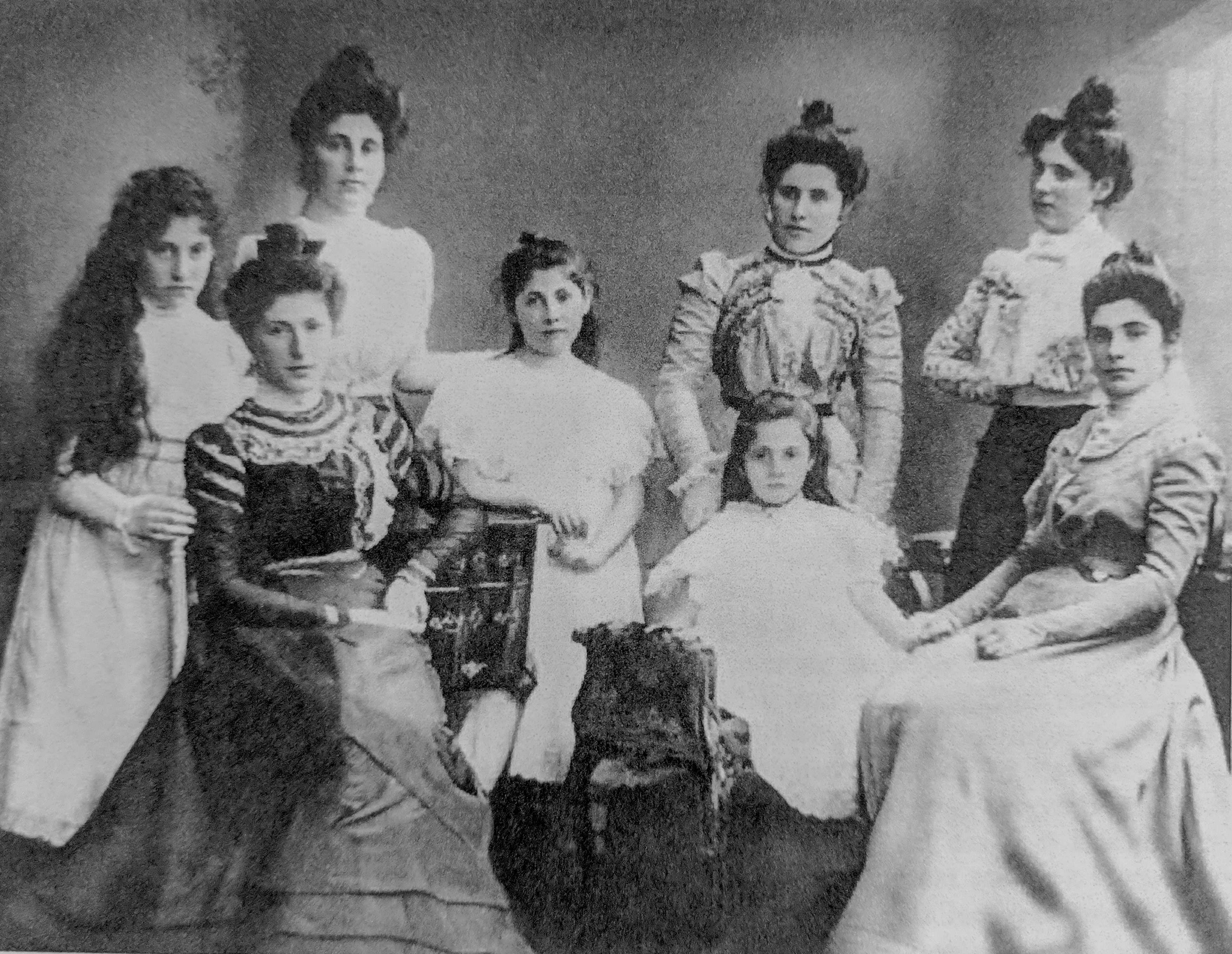 Rosa Buchthal mit Geschwistern. Von links: Martha, Clara, Sophie, Hedwig, Helene, Mathilde, Johanna, Rosa. Das Foto ist nicht exakt datiert, sondern mit dem Vermerk "um 1895".